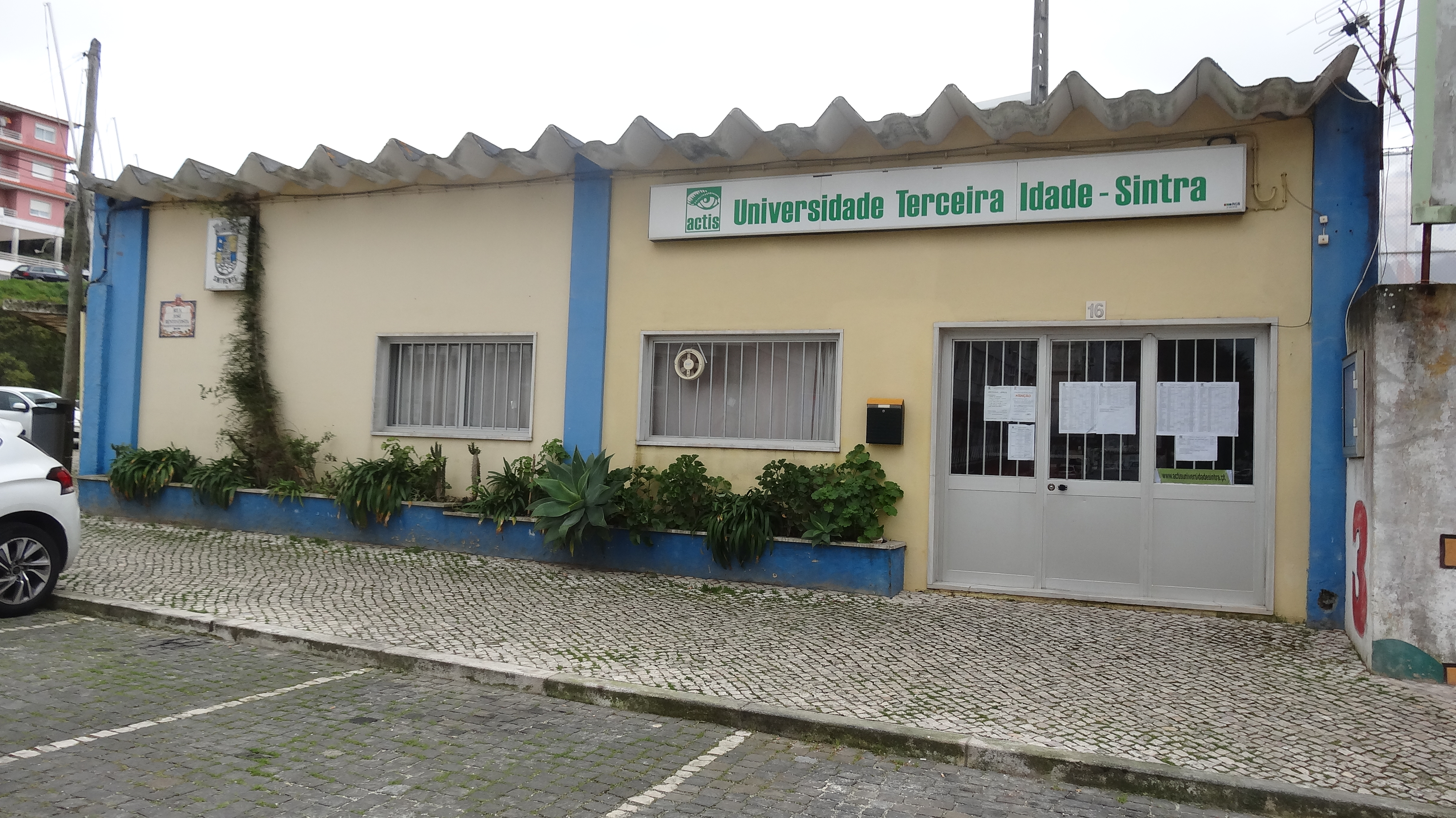 Universidade Sénior de Sintra - Instalações na Portela de Sintra